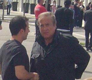 Ludovic Giuly et Charles Villeneuve.